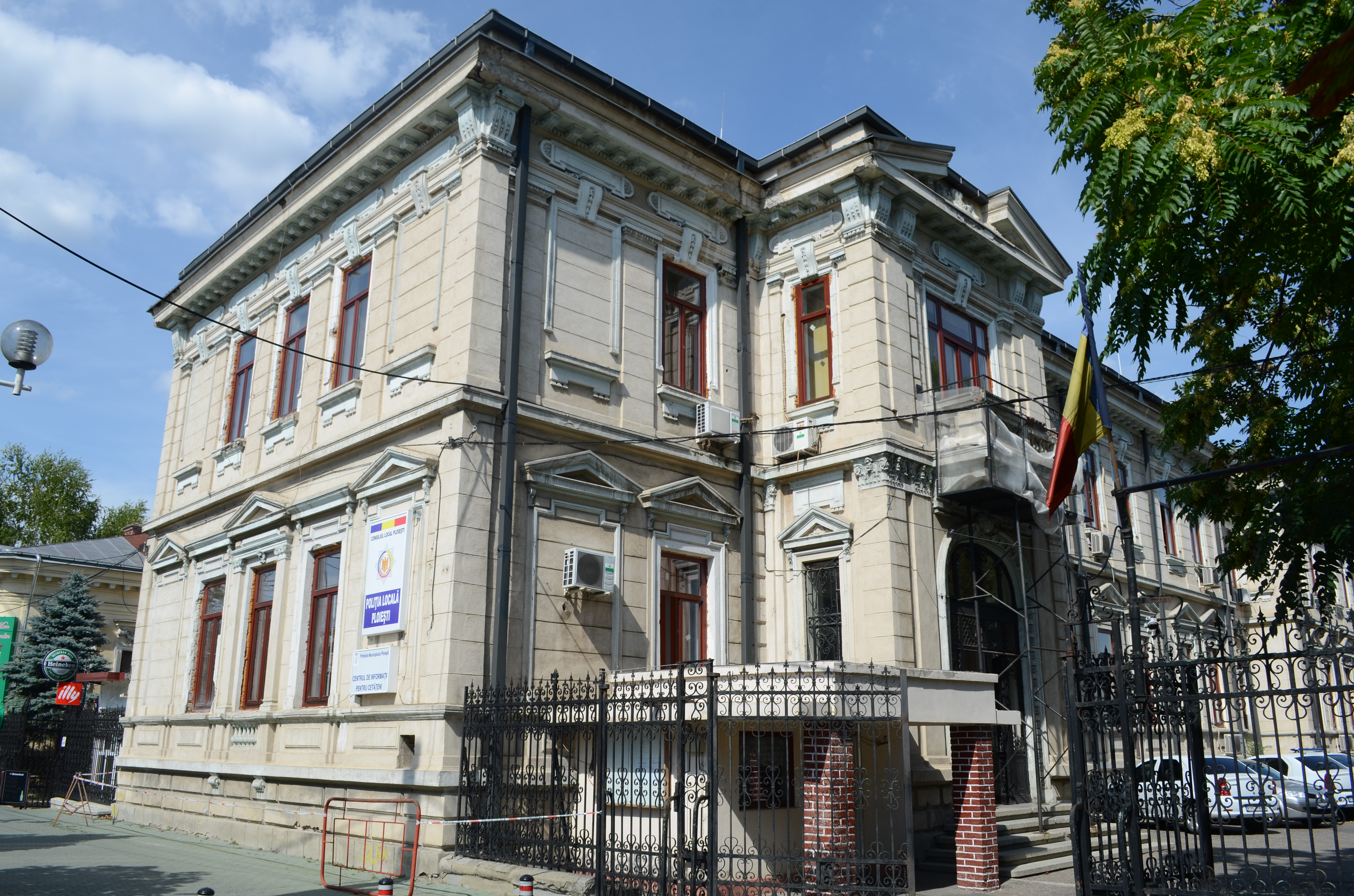 Casa Grigore Scorțeanu, Dimitrie Sfetescu, azi Poliția Comunitară Ploiești, Bd. Independenței nr. 21